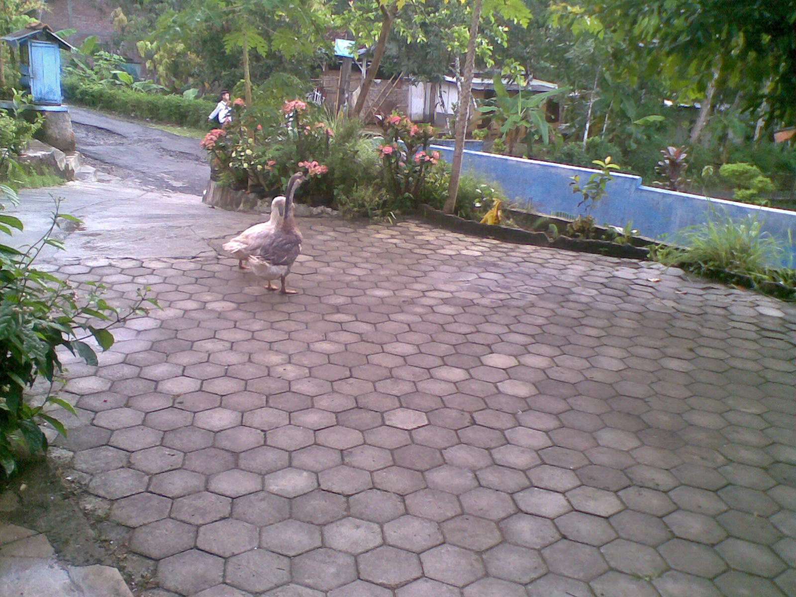 Sepasang Angsa yang sedang bermain di halaman rumah seorang warga di Buniayu